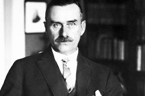 Der Schriftsteller Thomas Mann im Jahr 1926